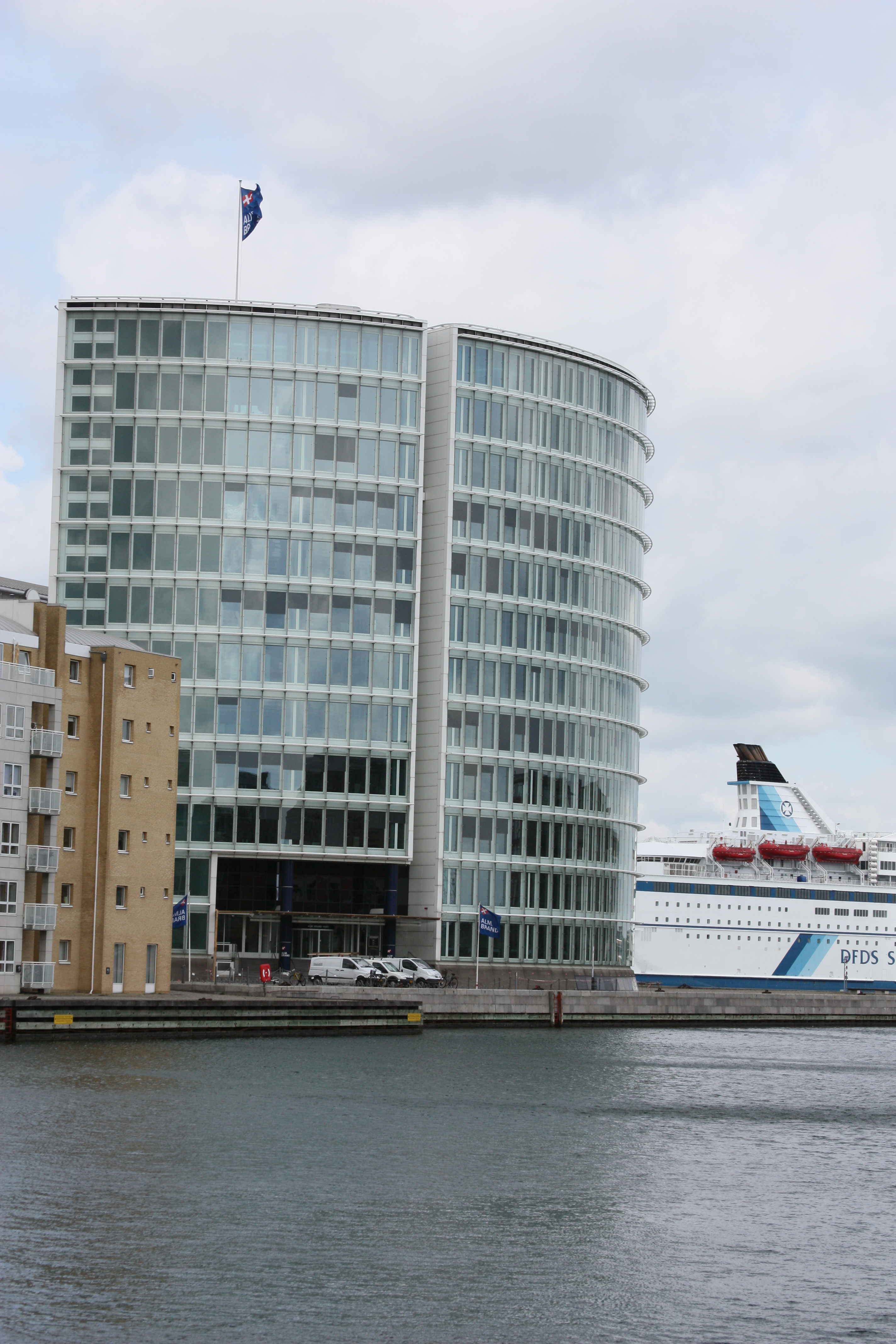 Kopenhagen 2009